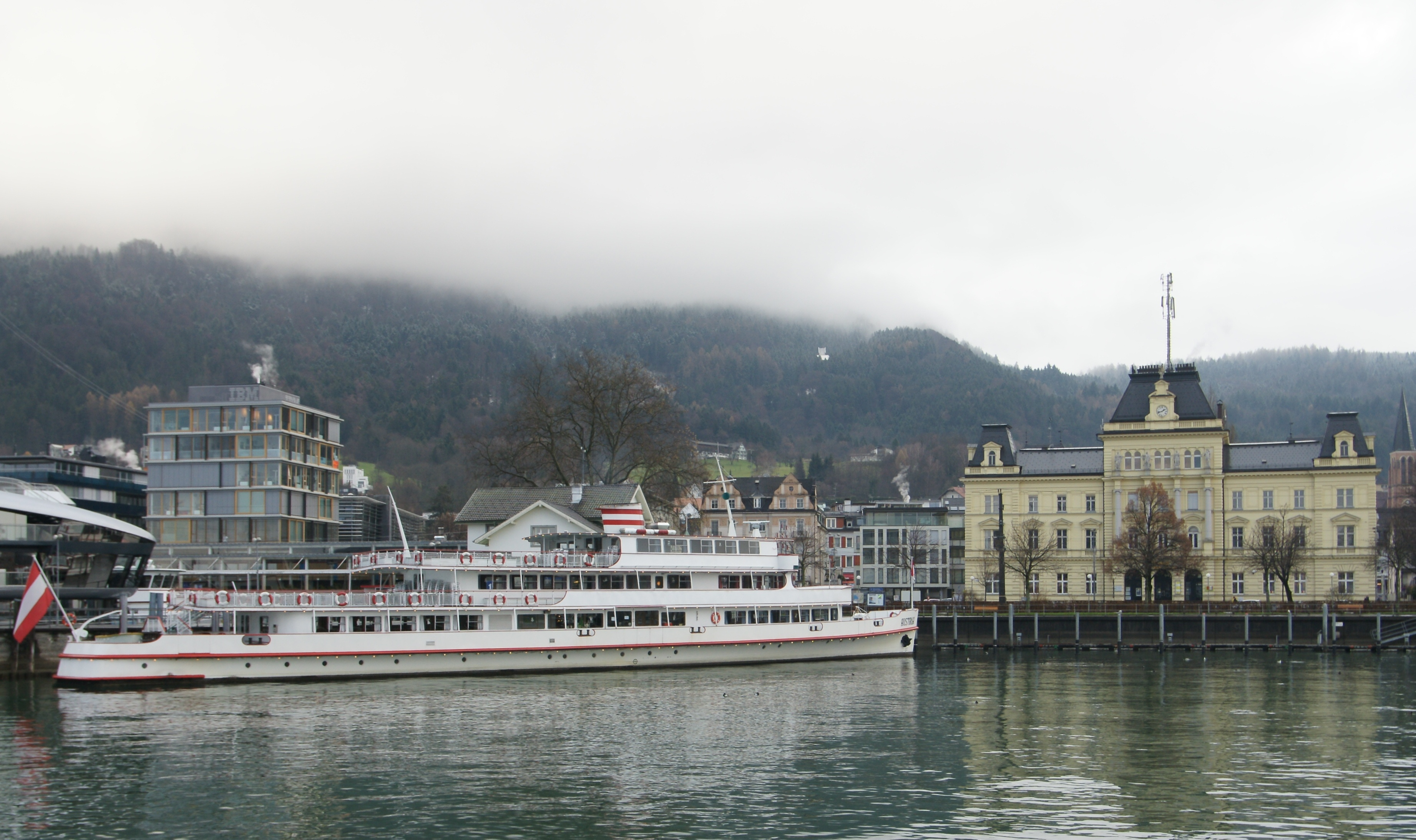 Das Motorschiff Austria ist ein Passagierschiff auf dem Bodensee mit dem Heimathafen Bregenz.